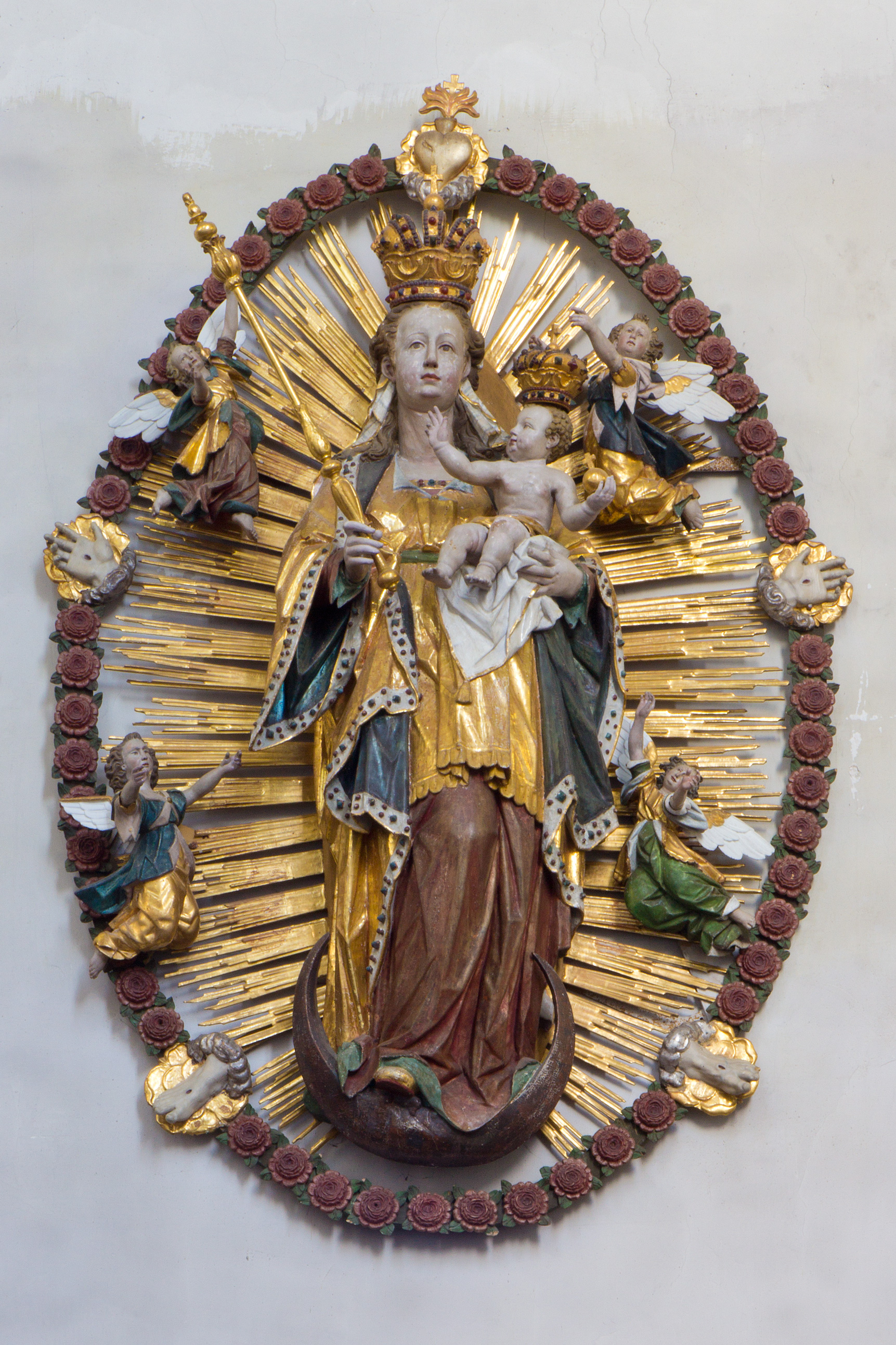 Stettener Gnadenbild mit Rosenkranz im ehemaligen Kloster Stetten im Gnadental in Stetten, einem Teilort von Hechingen im Zollernalbkreis (Baden-Württemberg). Gegründet wurde es als Augustinerinnenkloster, bereits im Jahr 1278 wurde es aber den Dominikanerinnen unterstellt. Es war im Mittelalter die Erbgrablege der Grafen von Zollern.